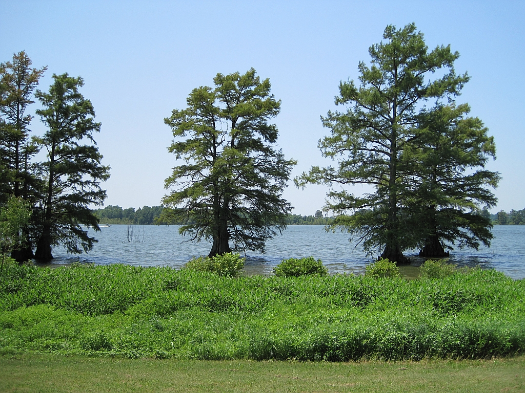 Horseshoe Lake, Arkansas Horseshoe Lake